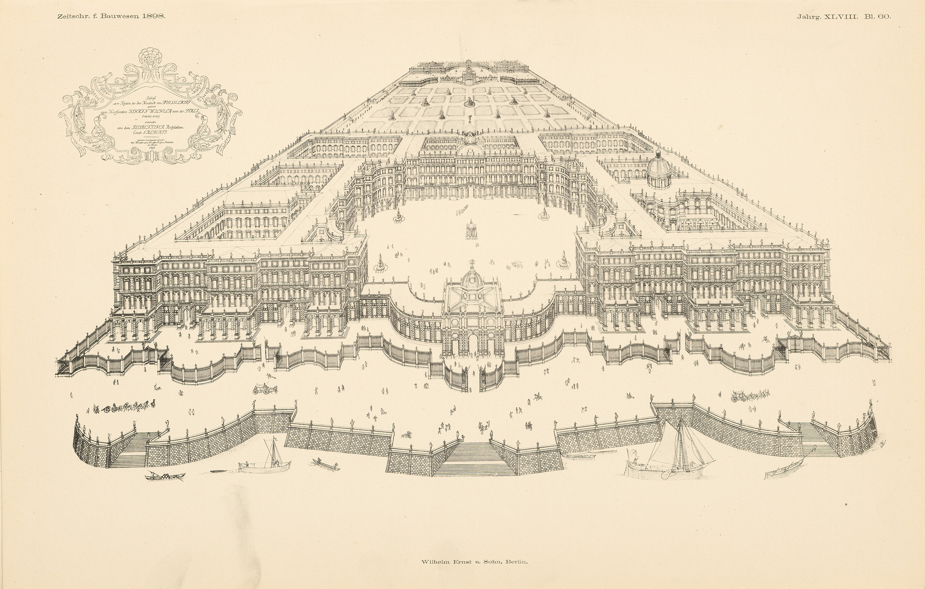 Plan des unverwirklichten Schlossneubaus in Heidelberg